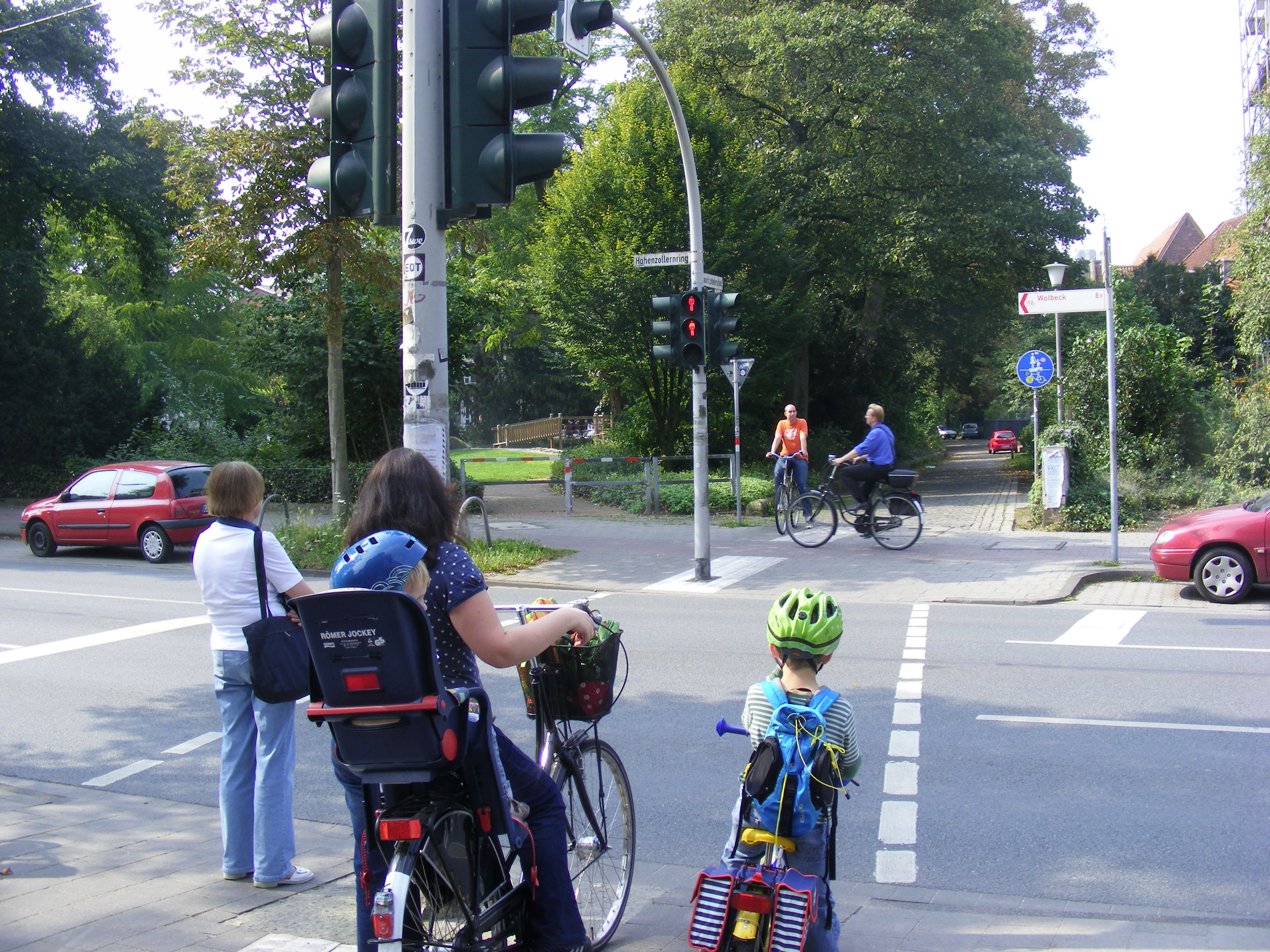 Münster-Sankt Mauritz: Ampel mit langern Wartezeiten für den Fahrradverkehr